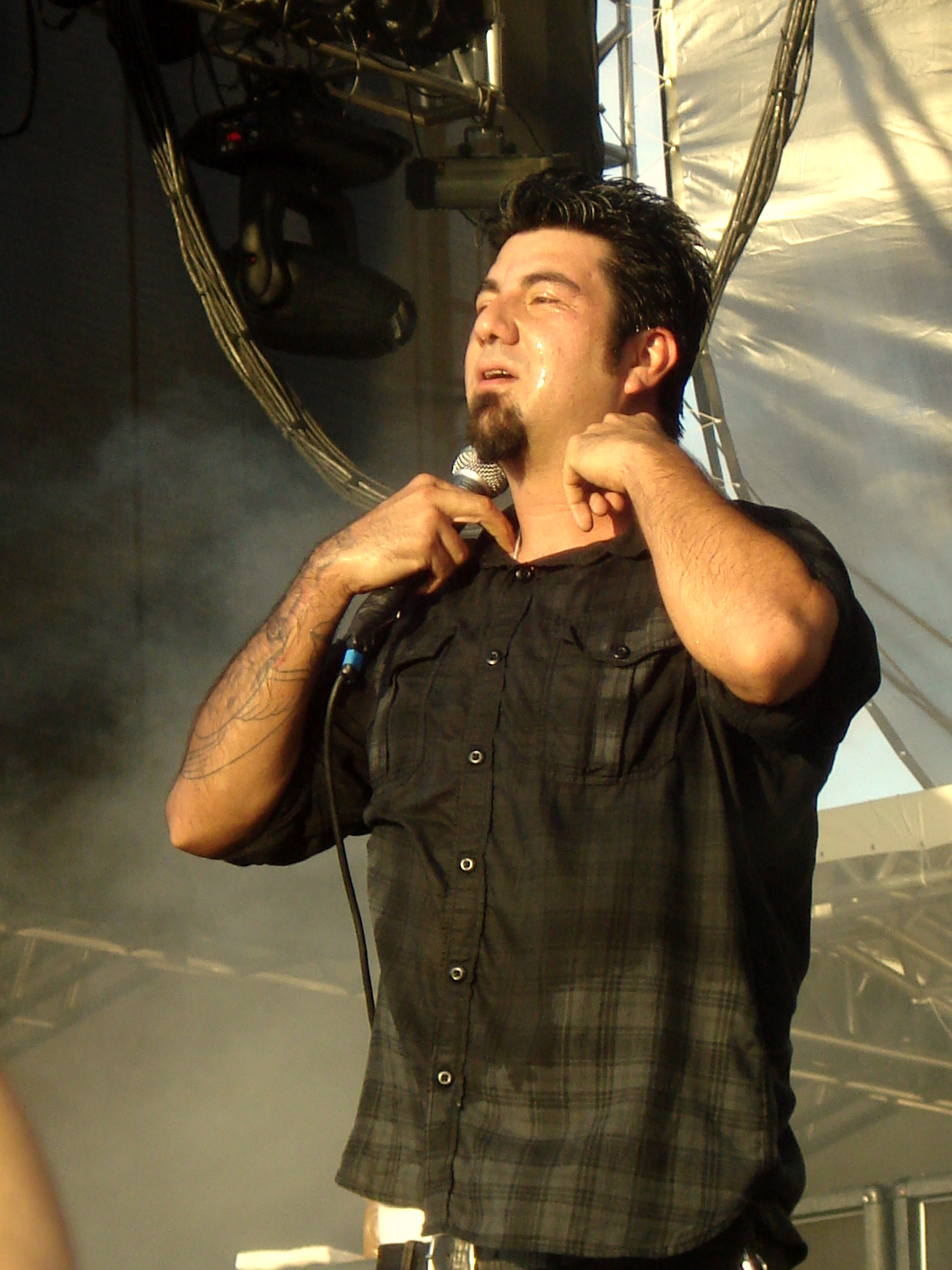 Maquinária Festival 2009 (São Paulo) - Deftones Concert